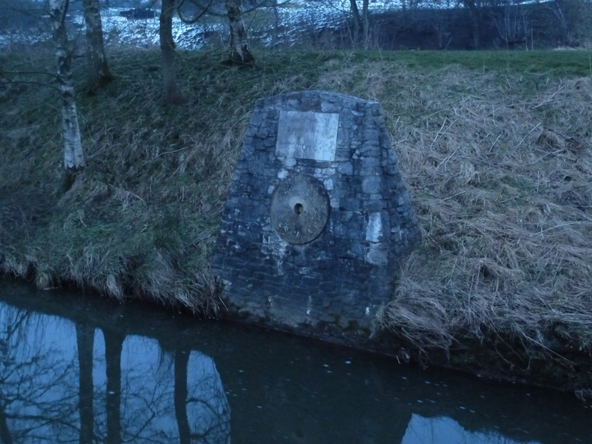 Tor der Upwards beim Shrovetidefußball